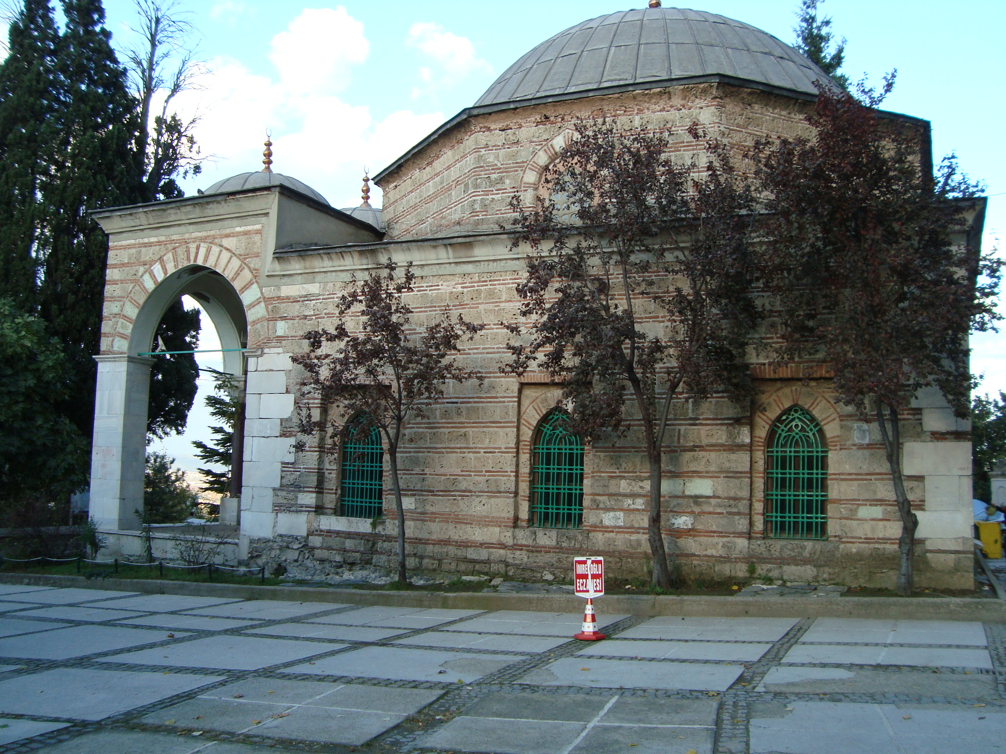 SULTAN YILDIRIM BEYAZIT TURBESİ-YILDIRIM-BURSA